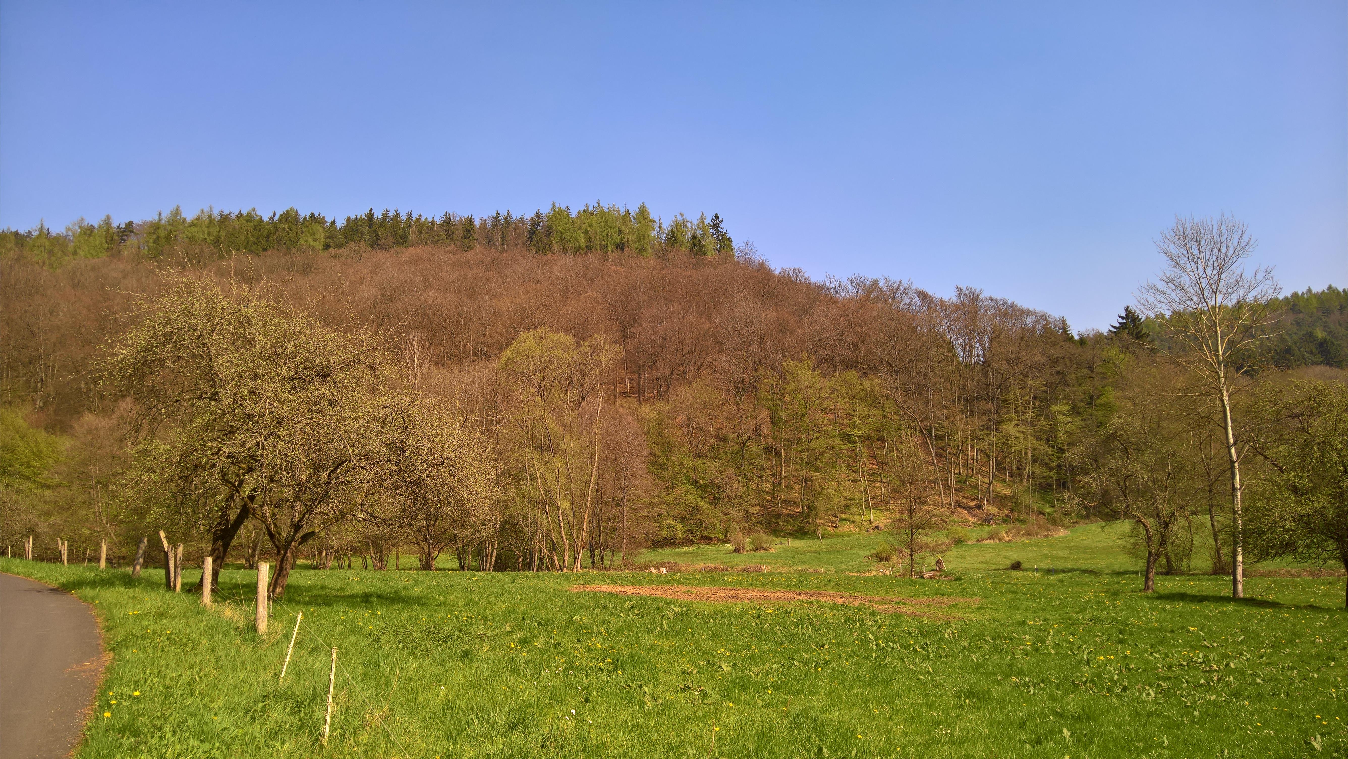 Ausläufer des Rehbergs am Haslochtal, Standort des Burgstalls Reinstein, das Haslochtal verläuft weiter aufwärts an der linken Bildseite ausgehend, rechte Bildseite: Richtung Nickelsmühle